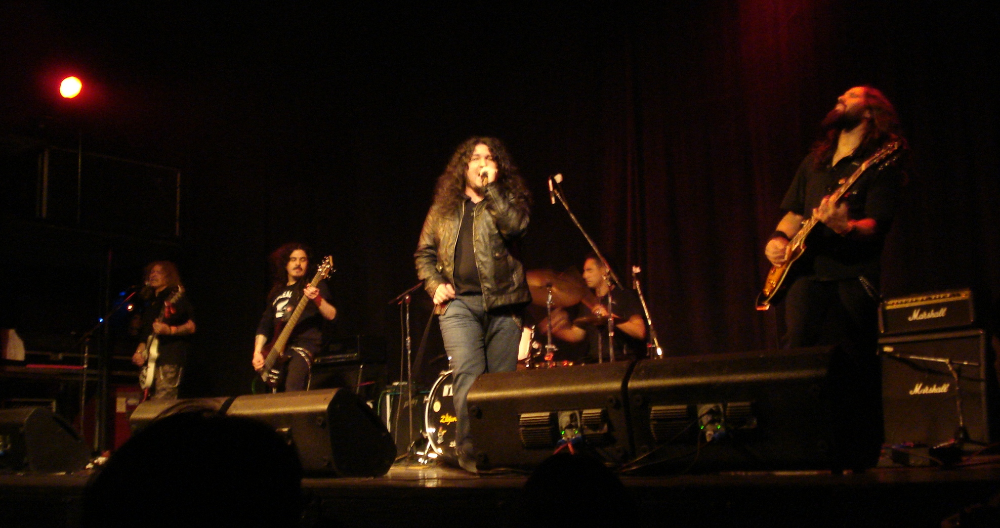 Renacer tocando en el teatro ND Ateneo como teloneros de JORN, 13 de julio 2011